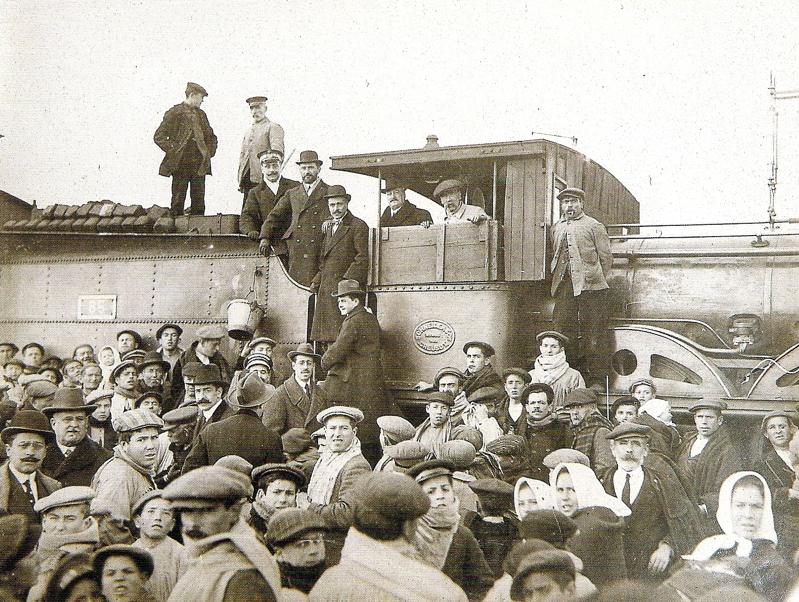 Público y autoridades rodeando y encaramadas a la locomotora del tren inaugural de la línea Cinco Casas - Tomelloso. Entre las autoridades destaca Francisco Martínez Ramírez, "El Obrero", impulsor durante años de esa línea ferroviaria.